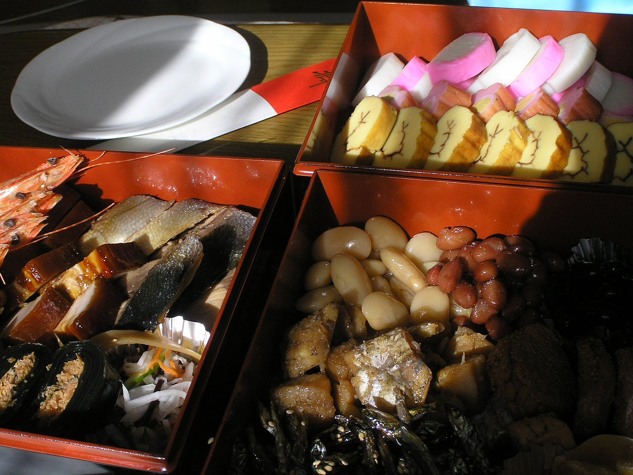 御節料理